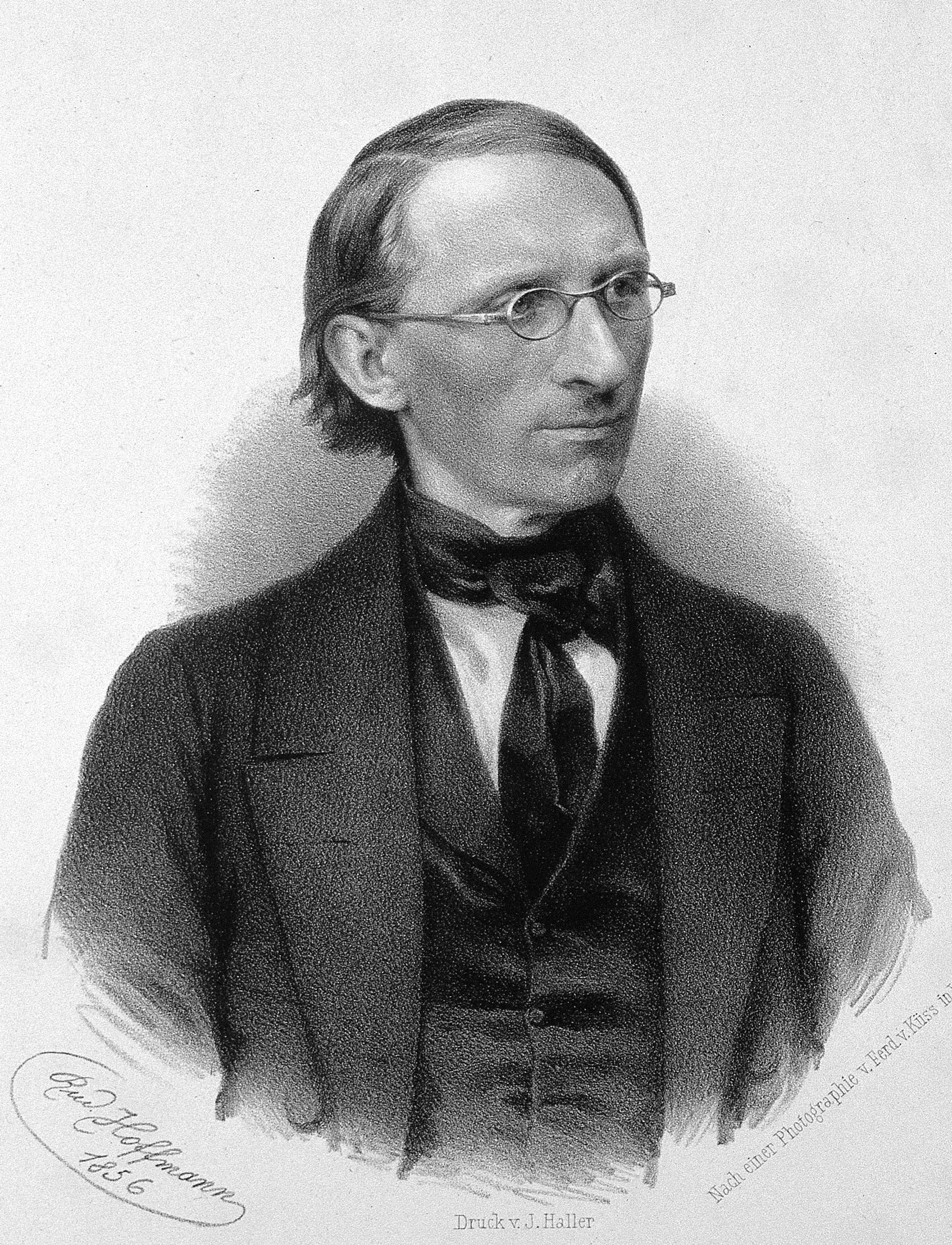 Carl Ludwig (physiologist)